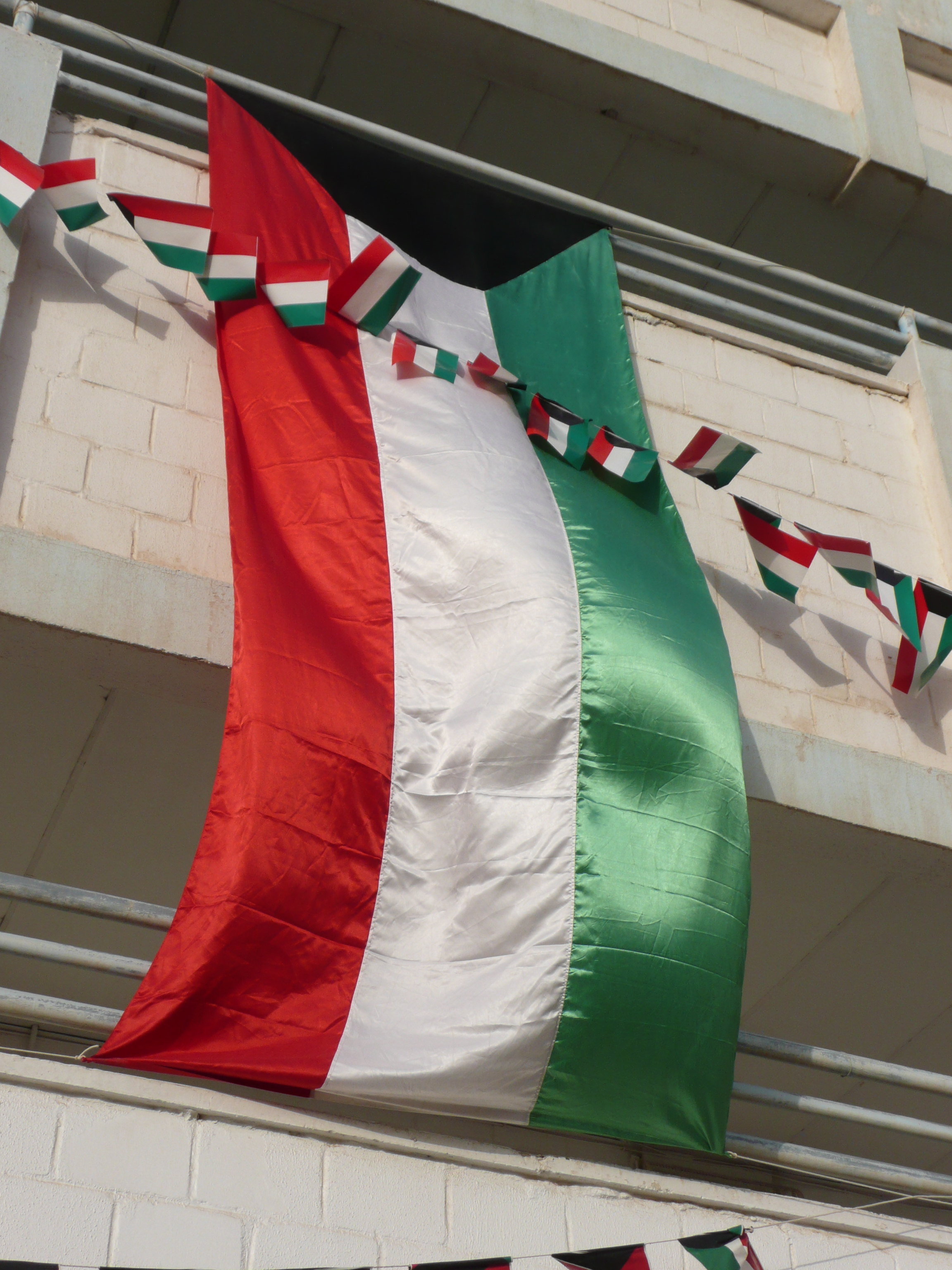 Kuwaiti Flag